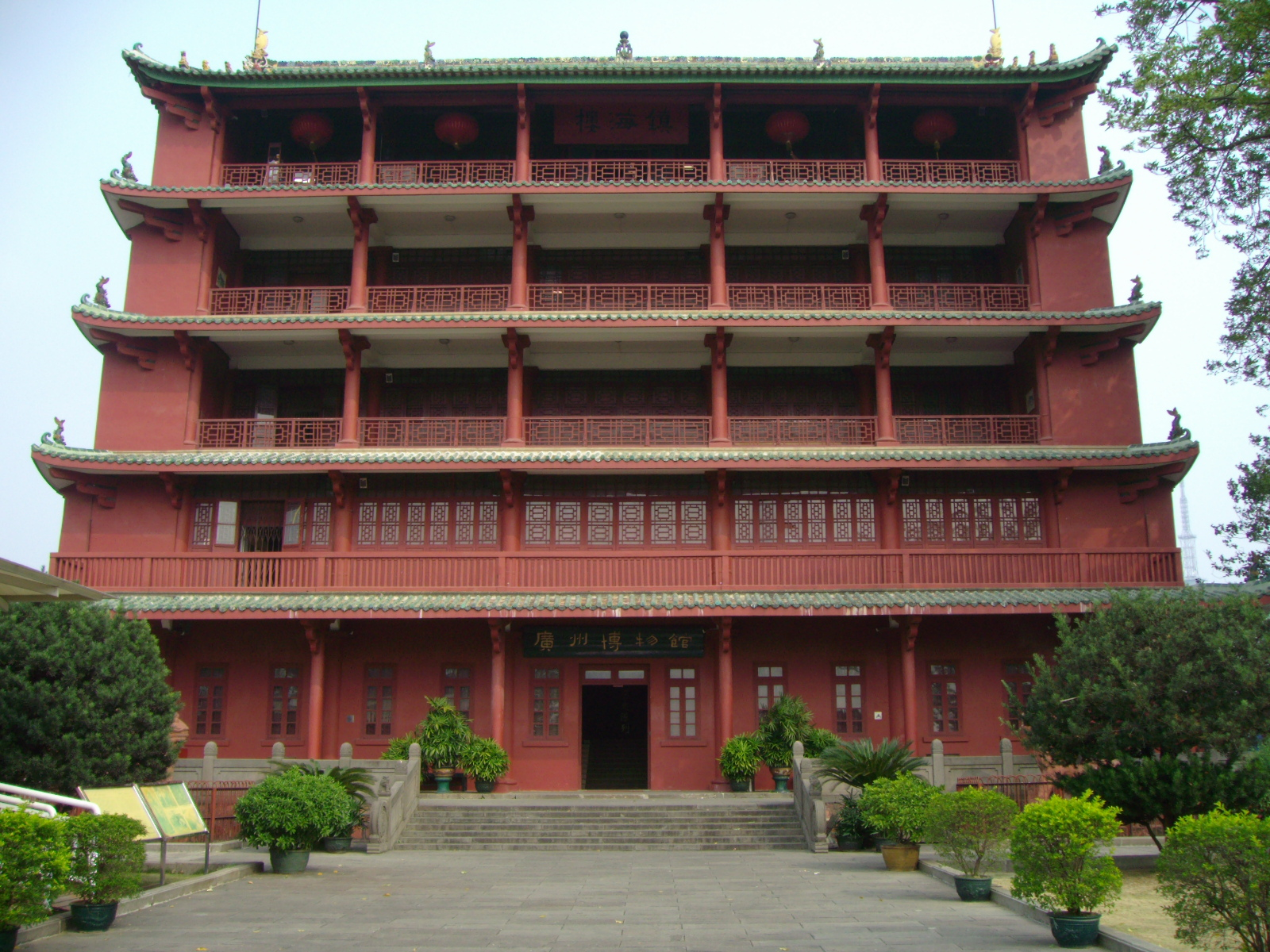 镇海楼，也就是广州博物馆